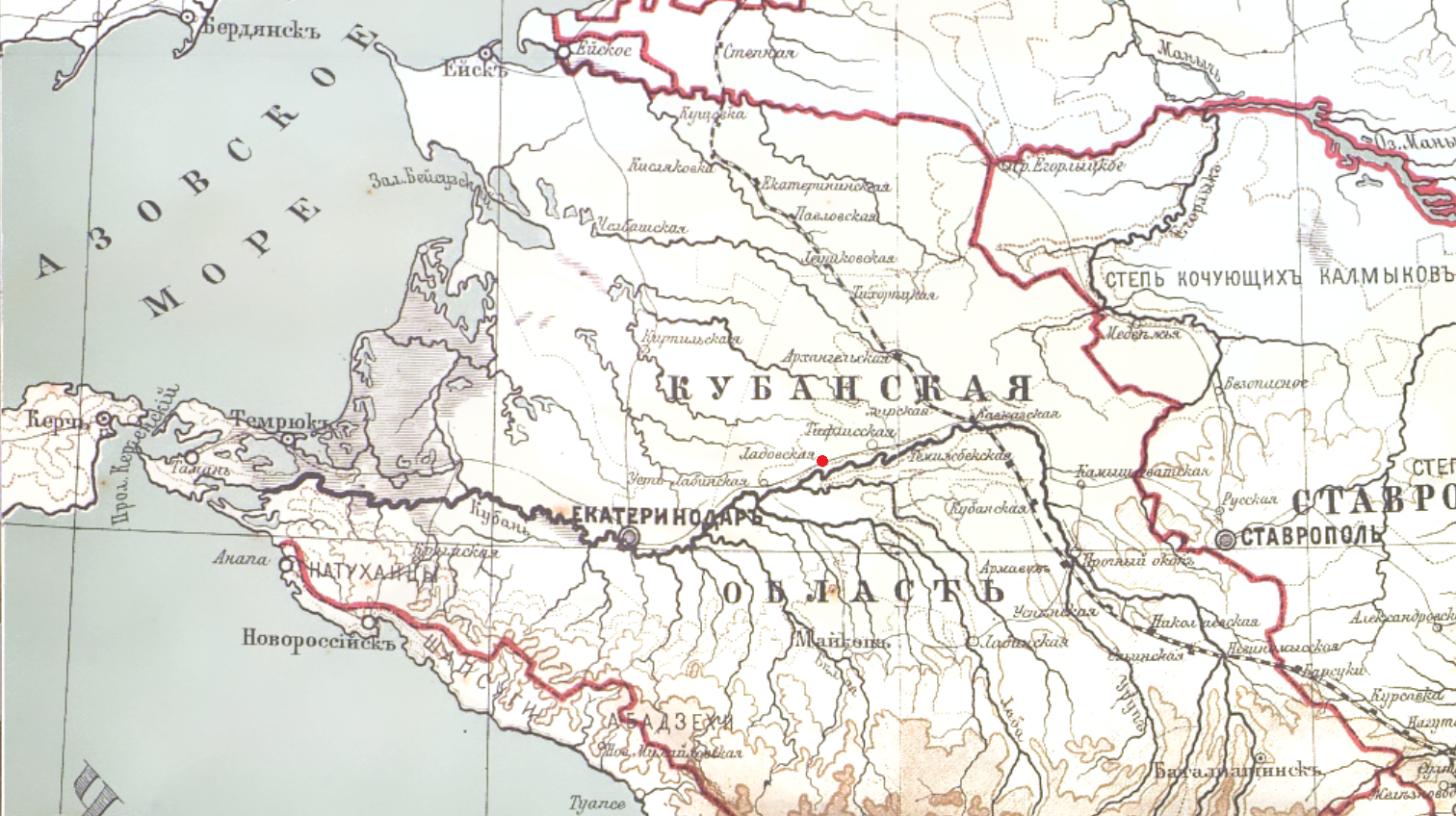 Историческая архивная общедоступная карта Кубани 1874 года